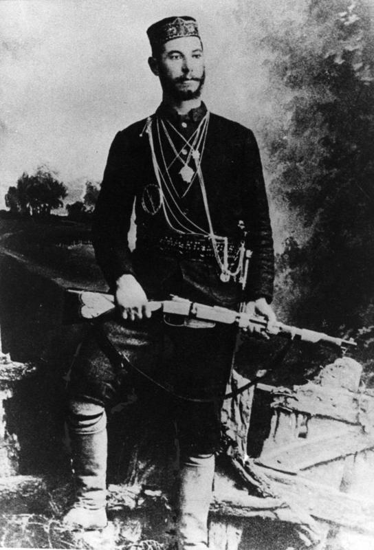 Стилянос Клидис.